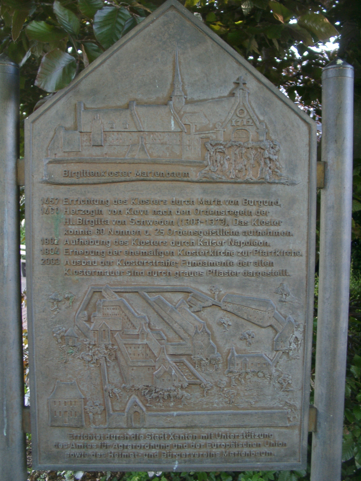 Tafel Marienbaum